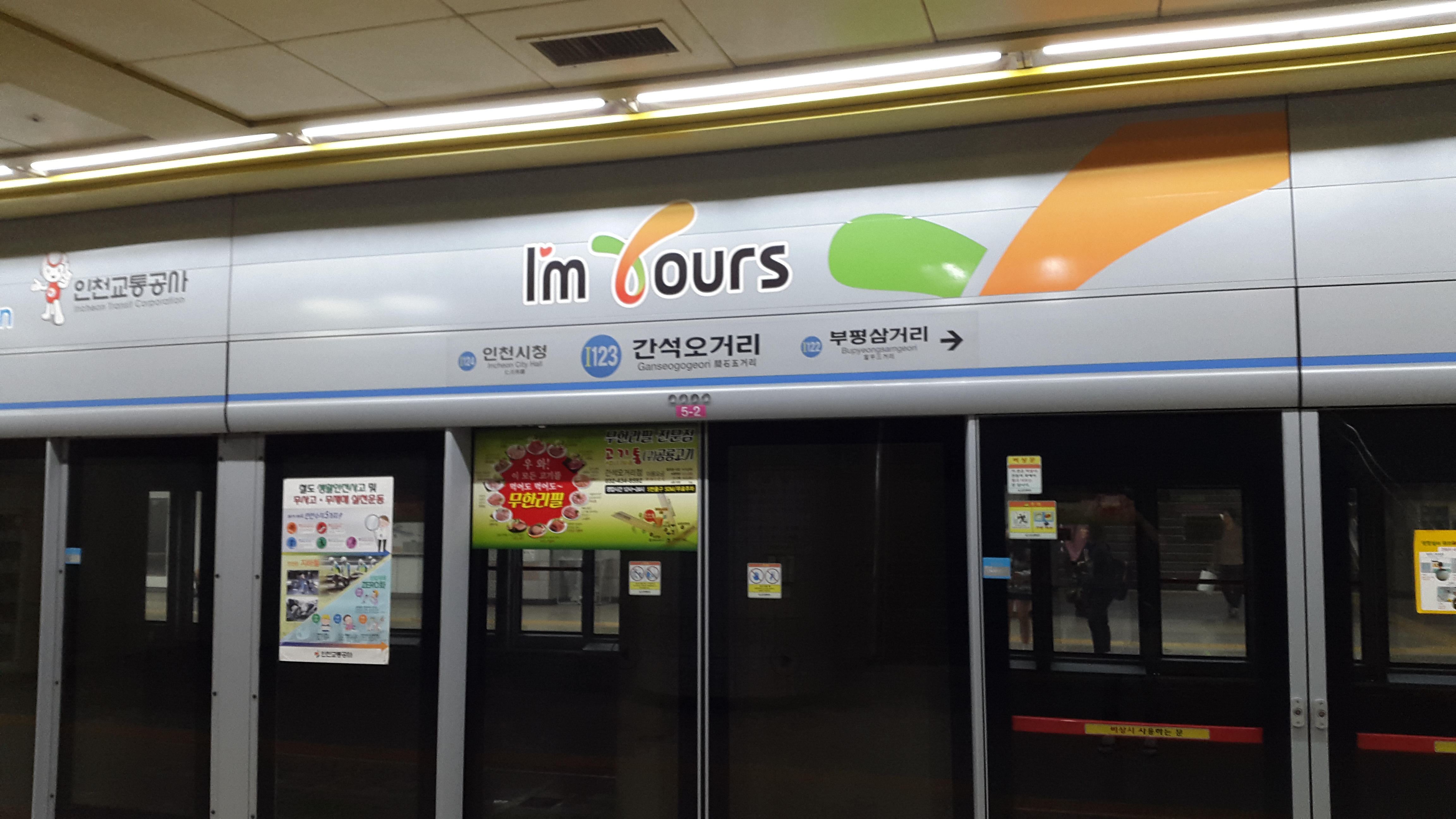 간석오거리역 스크린도어